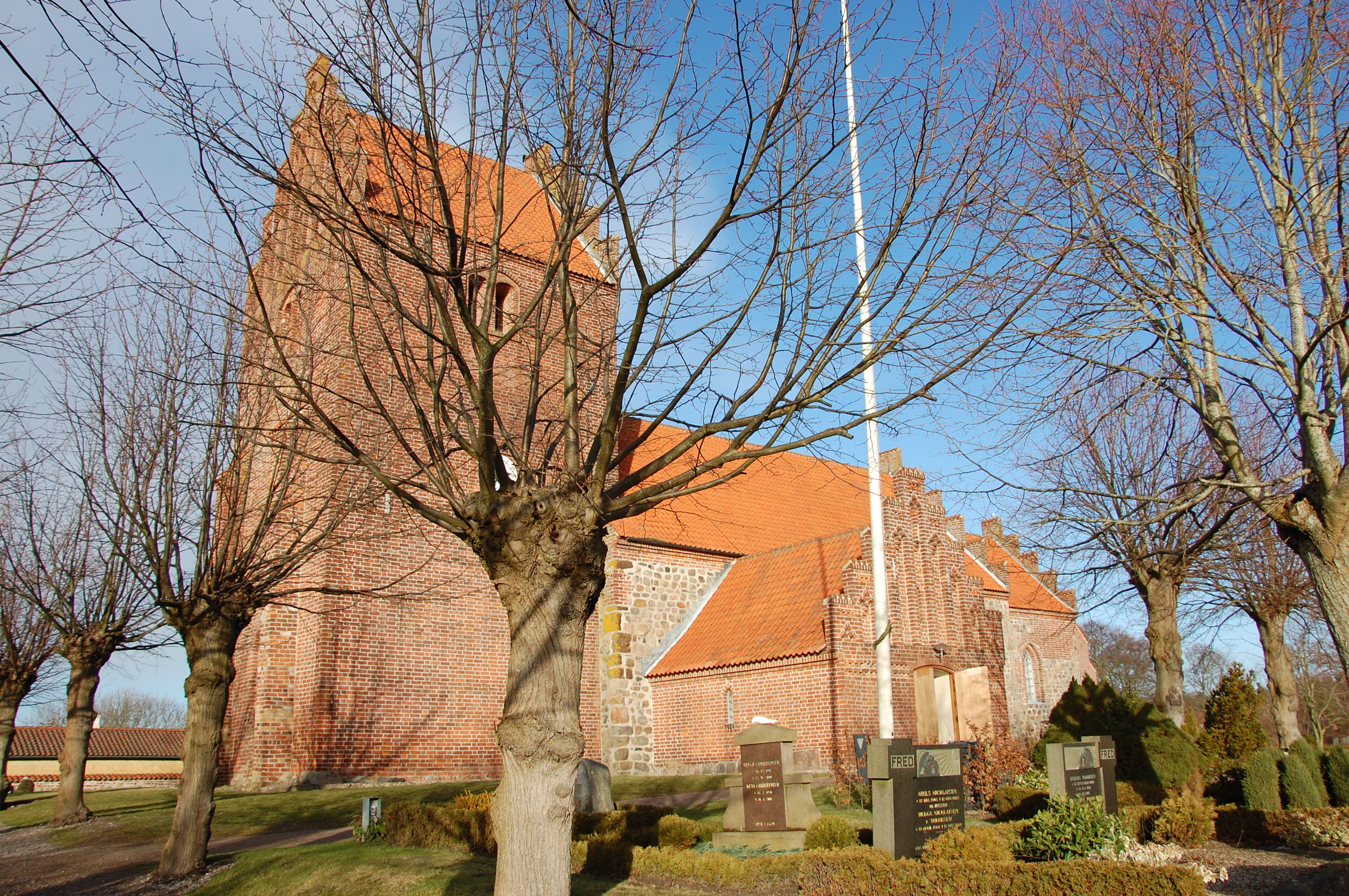 Kirche von Hojby